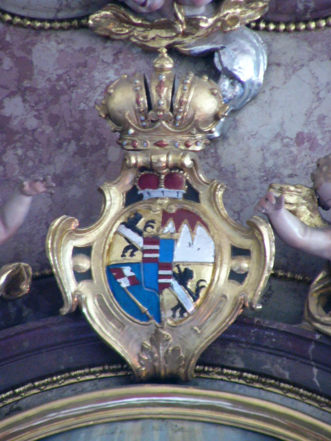 Wappen des Bamberger Fürstbischofs Franz Ludwig von Erthal in der katholischen Schlosskirche von Absberg